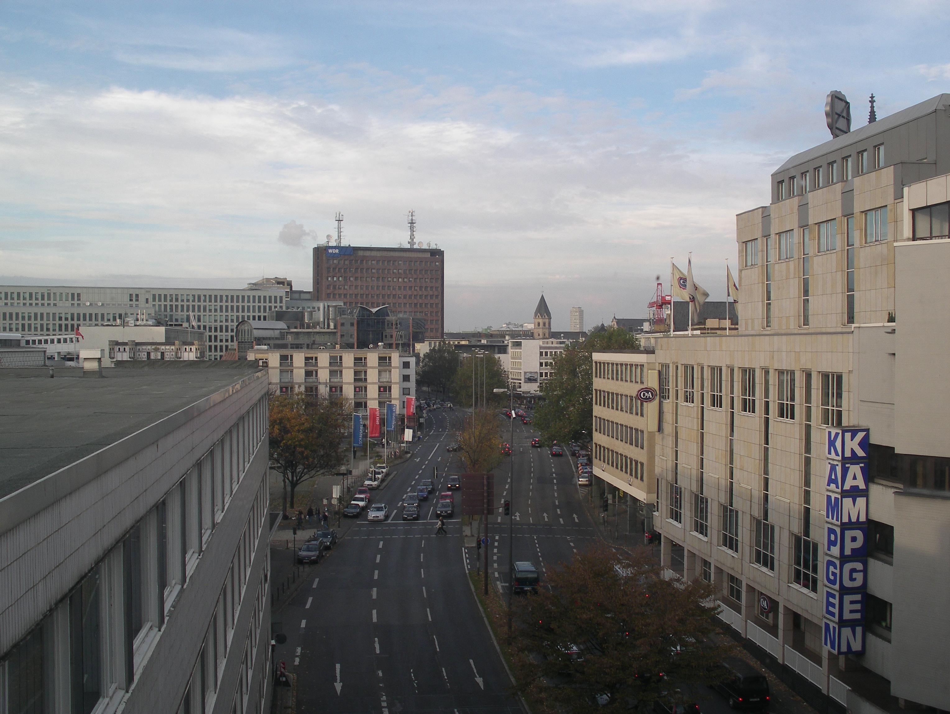 Nord-Süd-Fahrt fotografiert vom 5. Stock der Überbauung in Höhe der Schildergasse (Wehmeyer-Haus). Rechts der Anfang der 90er Jahre erbaute Neubau des C & A-Kaufhauses, im Hintergrund in der Mitte das WDR-Archivgebäude, rechts daneben der Turm von Sankt Andreas